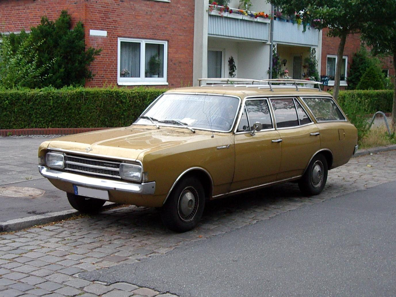 Opel Rekord C 4-türiger Kombi Frontansicht